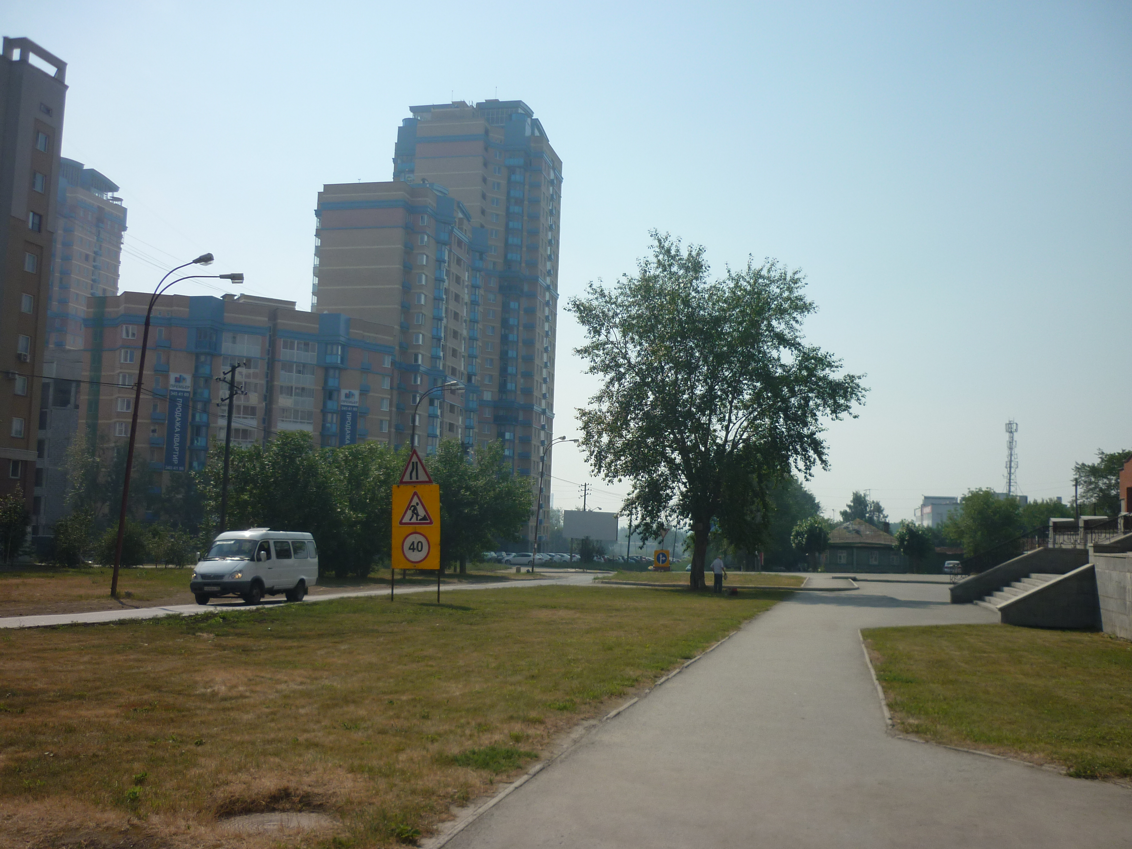 Вид на жк "Премьер" от Центробанка. Улица Серова. 56.8050436, 60.5991215